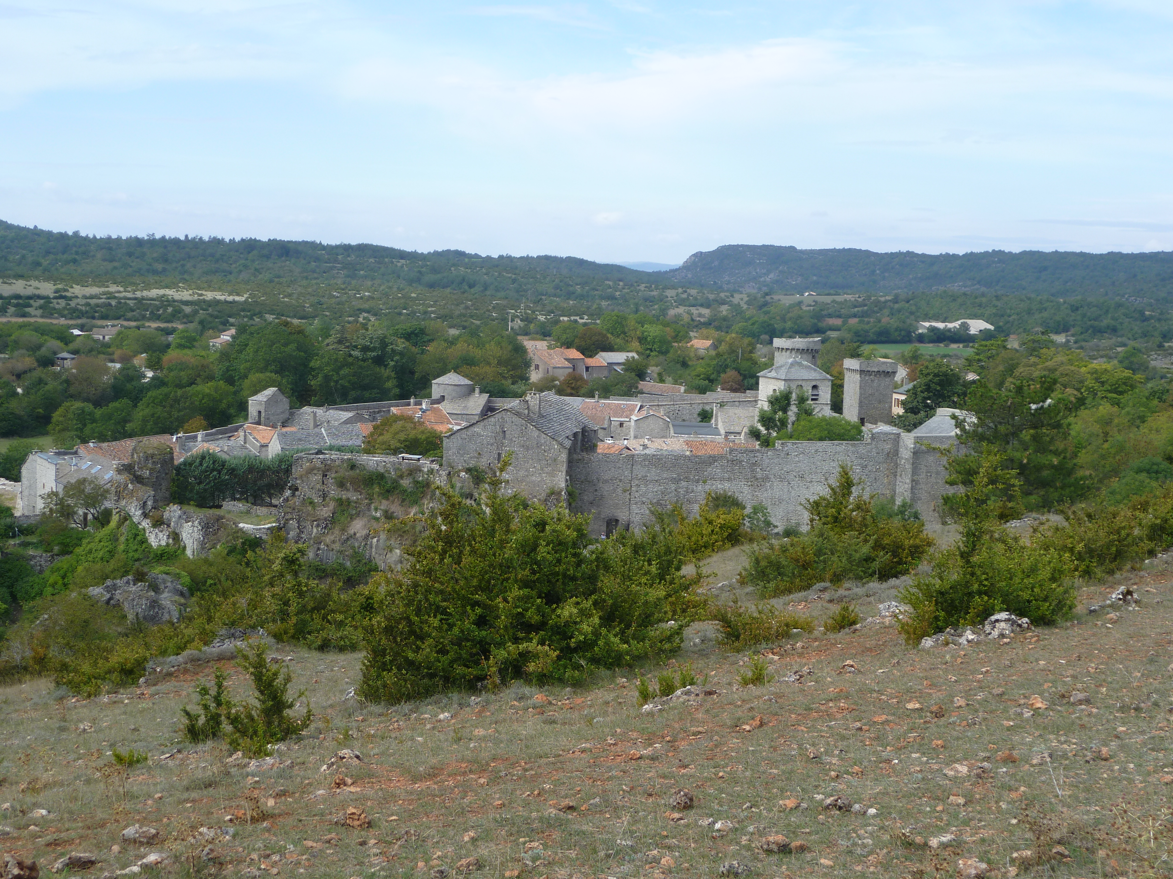 Remparts est du village vus depuis le moulin à vent. Sur la droite on distingue le cloché de l'église "Saint Christol" ainsi que la tour carré Nord de la porte principale dite "Portal d'Amoun"